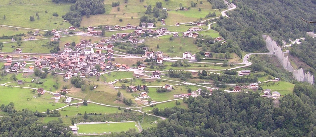 Le village d'Euseigne, vu depuis Saint-Martin. Val d'Hérens au Valais.